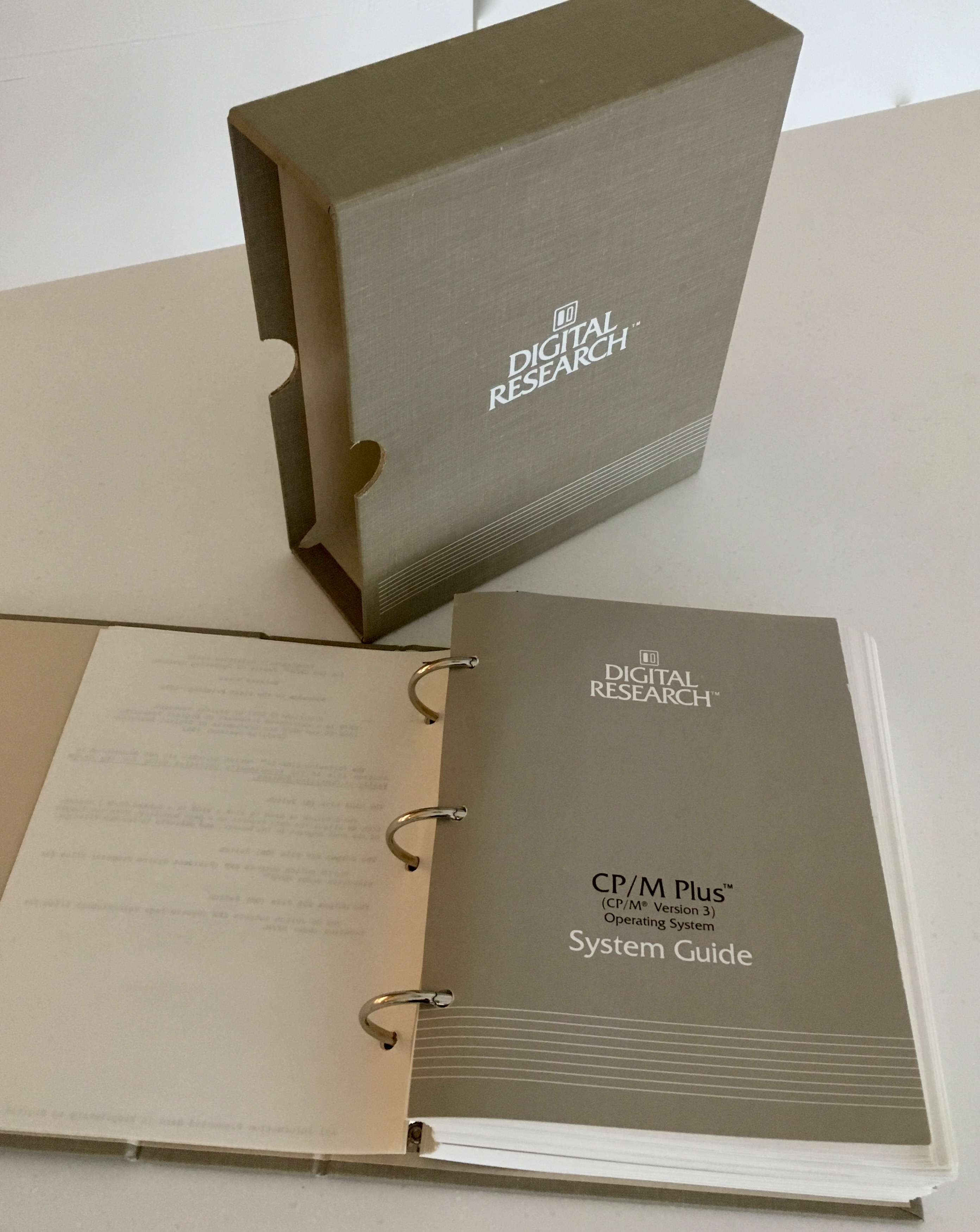 Med CP/M Plus (CP/M 3) satte Digital Research en ny standard for system-dokumentasjon til mikrodatamaskiner.